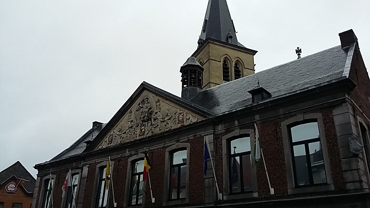 Het oude stadhuis van Bree